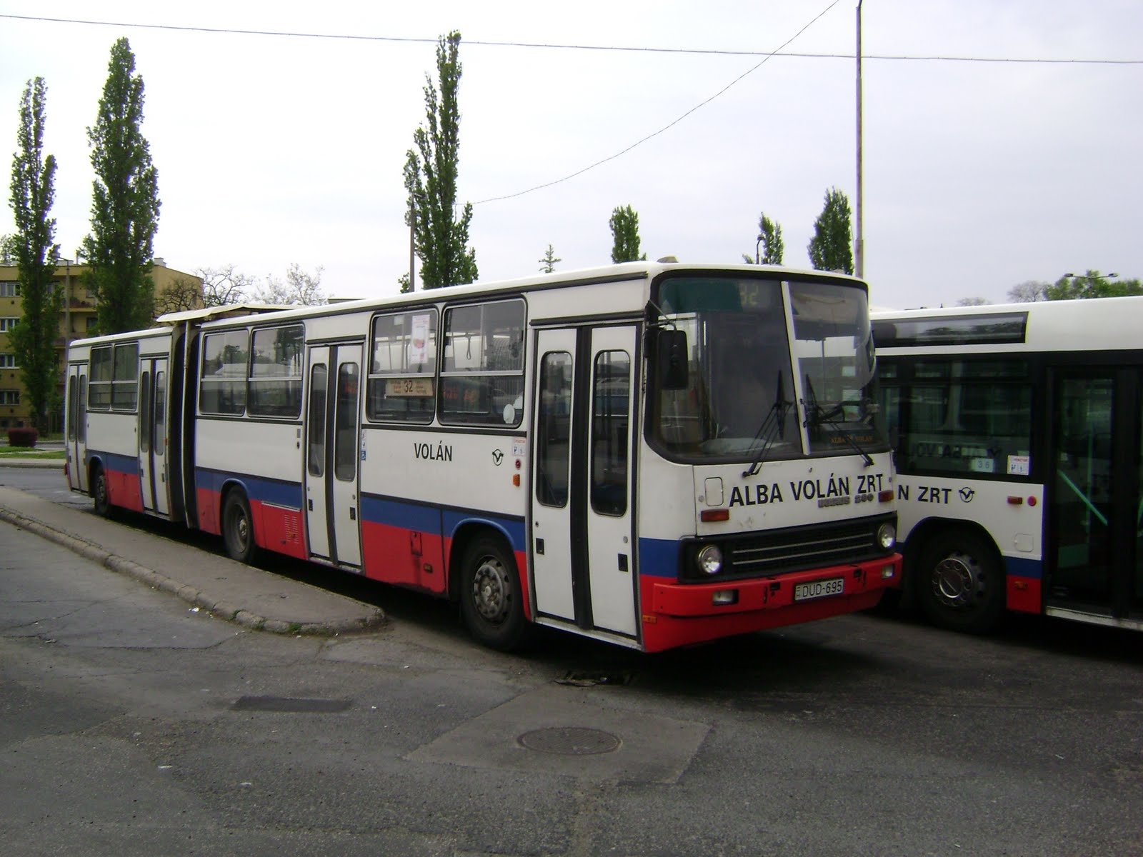 Székesfehérvári 32-es busz a Vasútállomás előtt